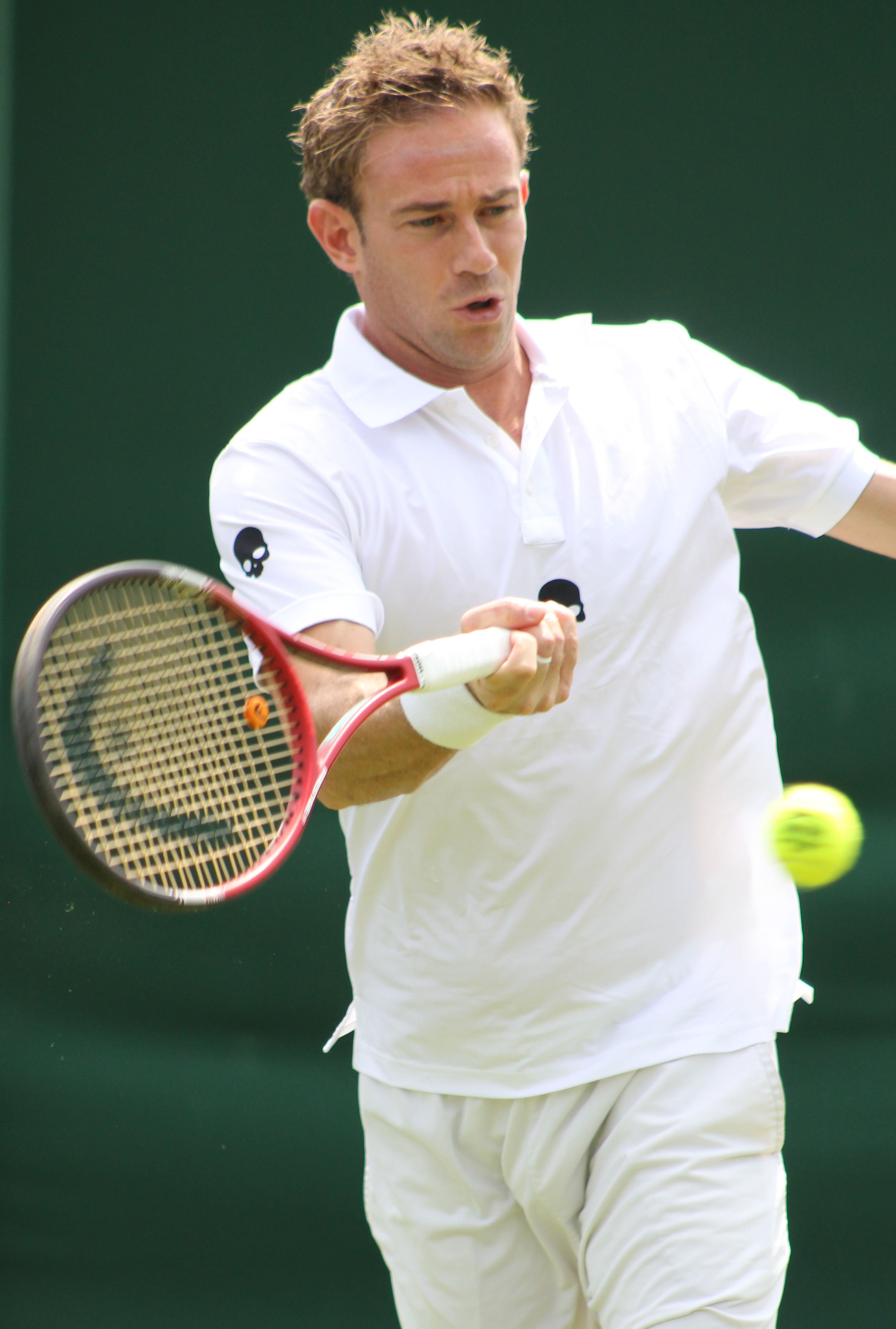 Volandri WM14 (9)